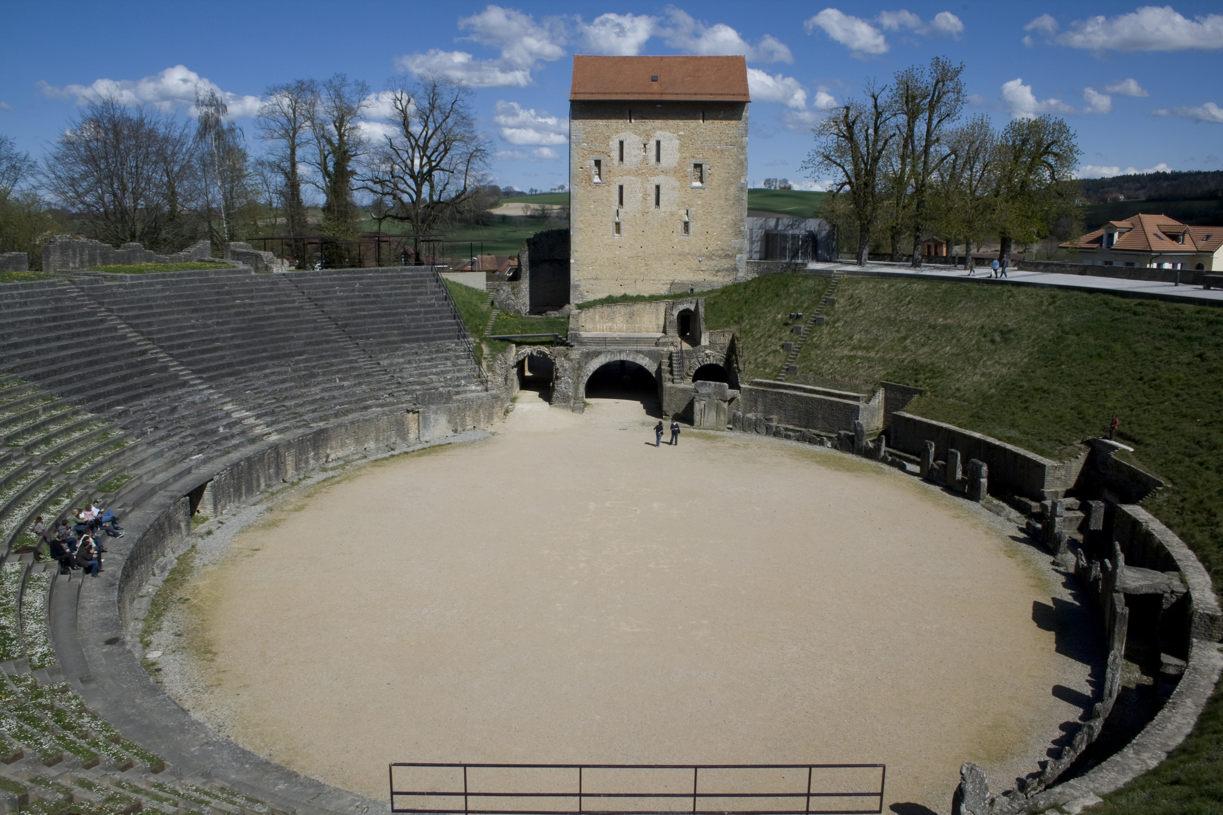 Arènes romaines à Avenches en Suisse.